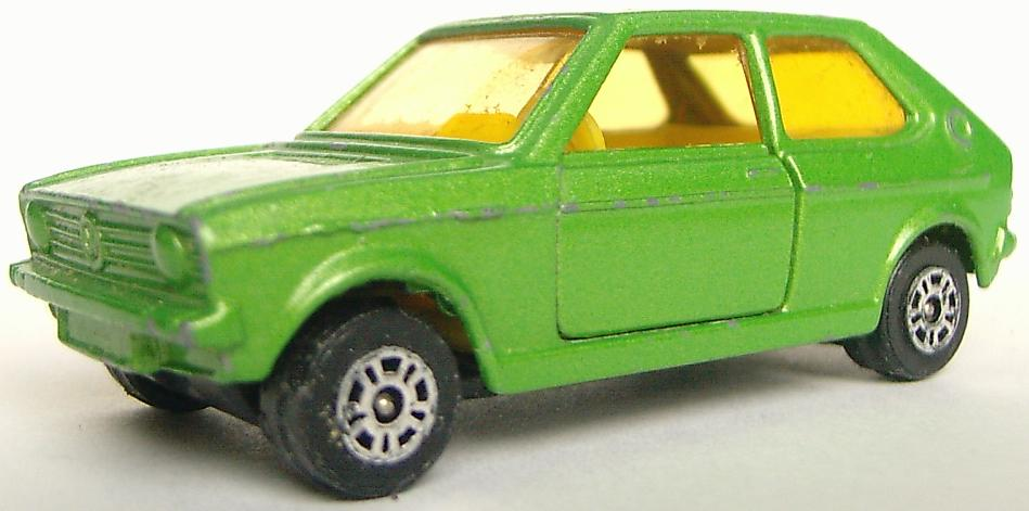 Corgi Volkswagen Polo Licensing Categorie:Afbeelding modelbouw